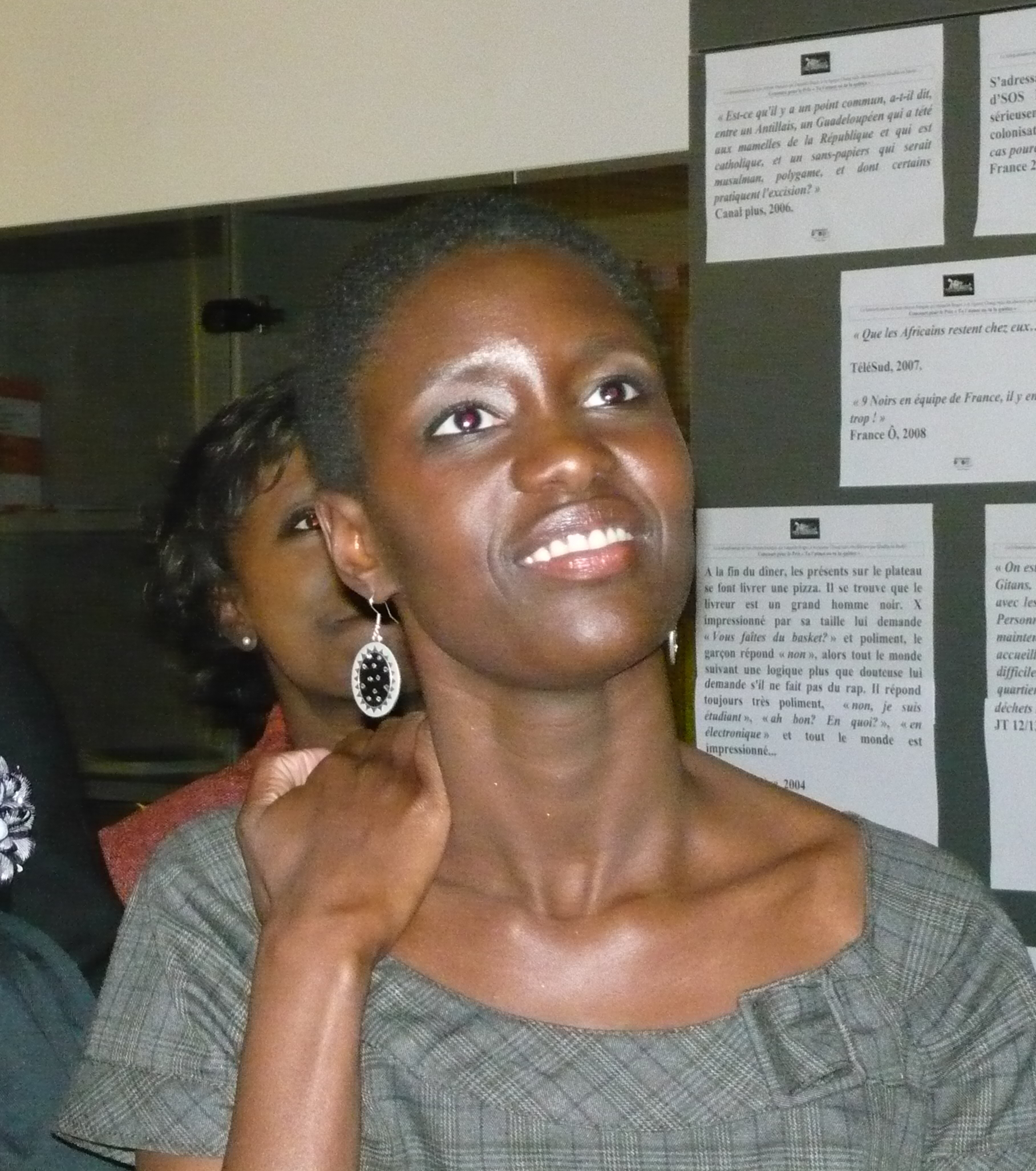 Rokhaya Diallo, présidente des Indivisibles